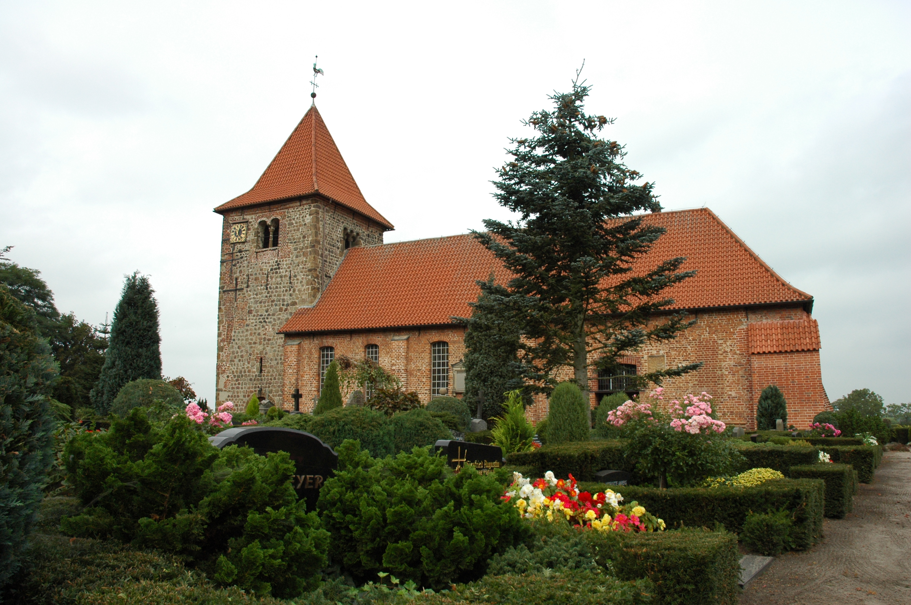 Dorfkirche St. Laurentius in Hasbergen (Stadtteil von Delmenhorst, Niedersachsen, Deutschland).